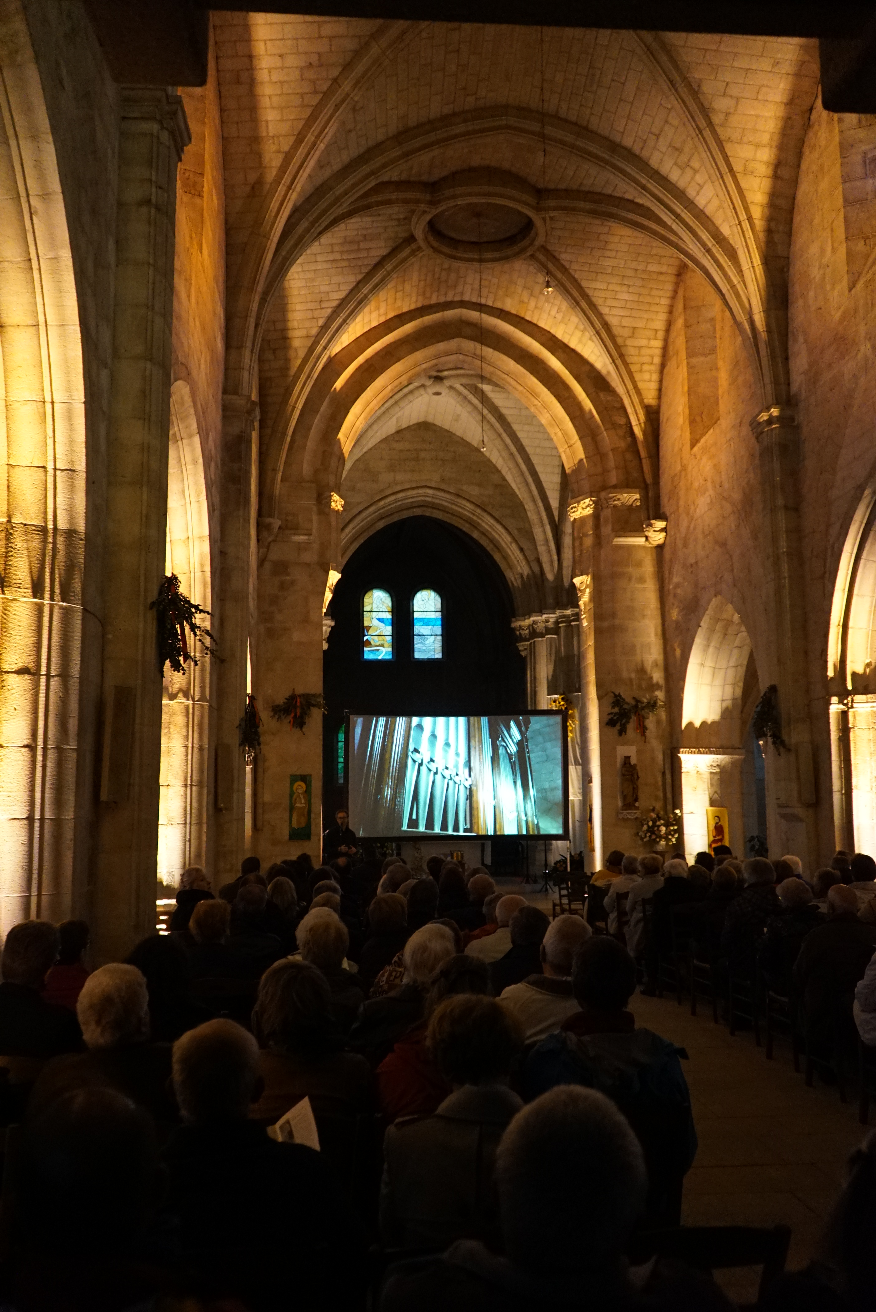 lors des rencontres d'orgues de fismes.